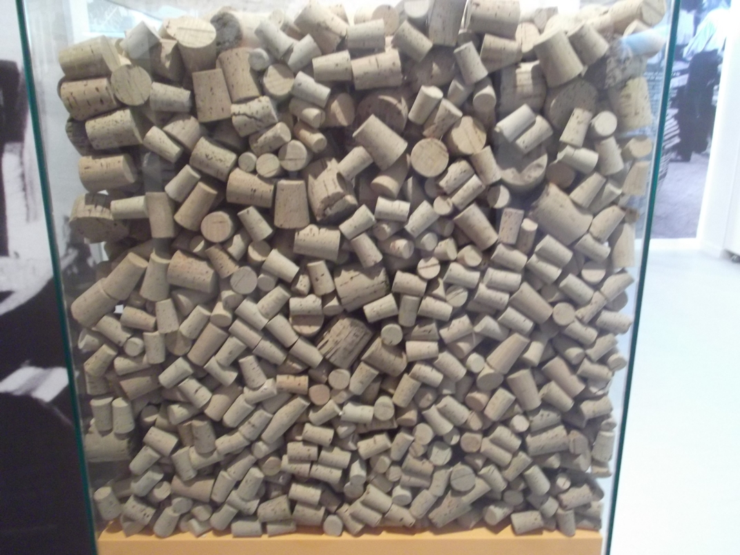 Museu del Suro de Palafrugell